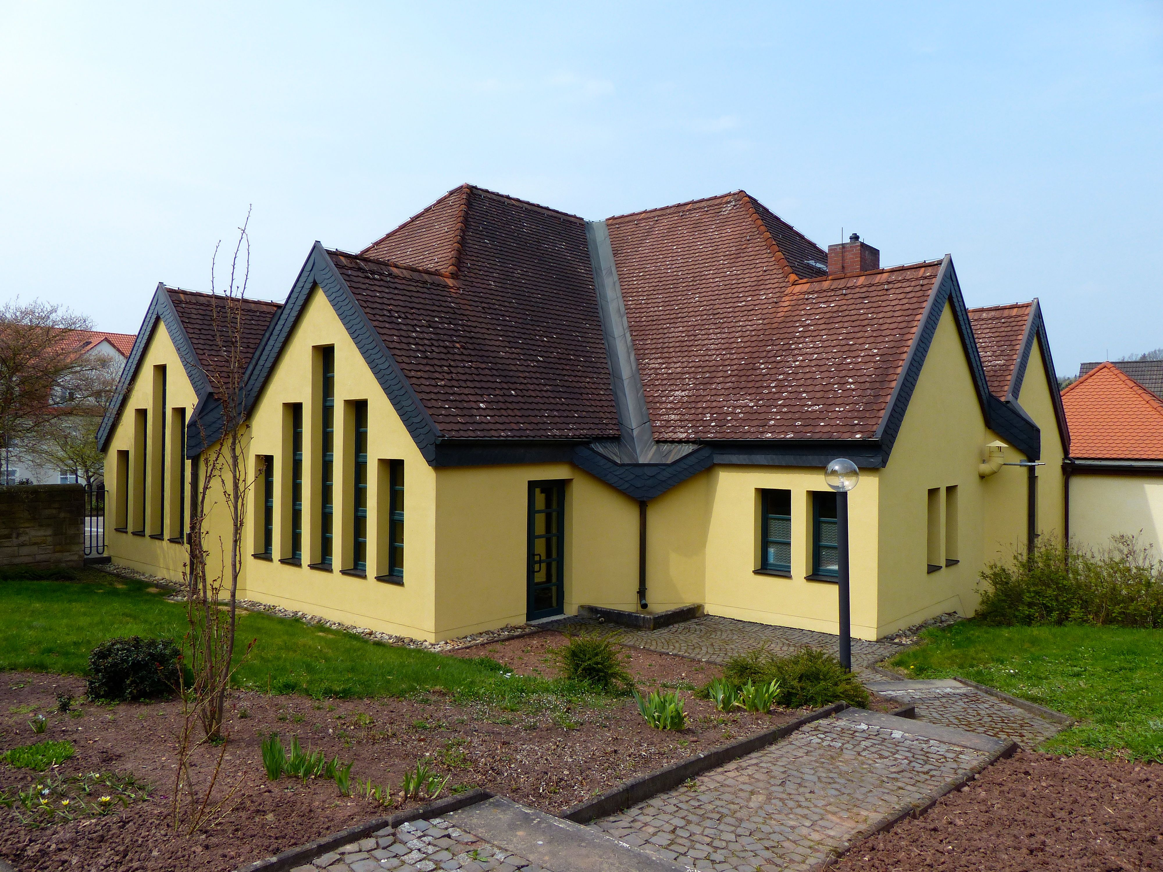 Das Pfarrzentrum von St. Bonifatius in Horras